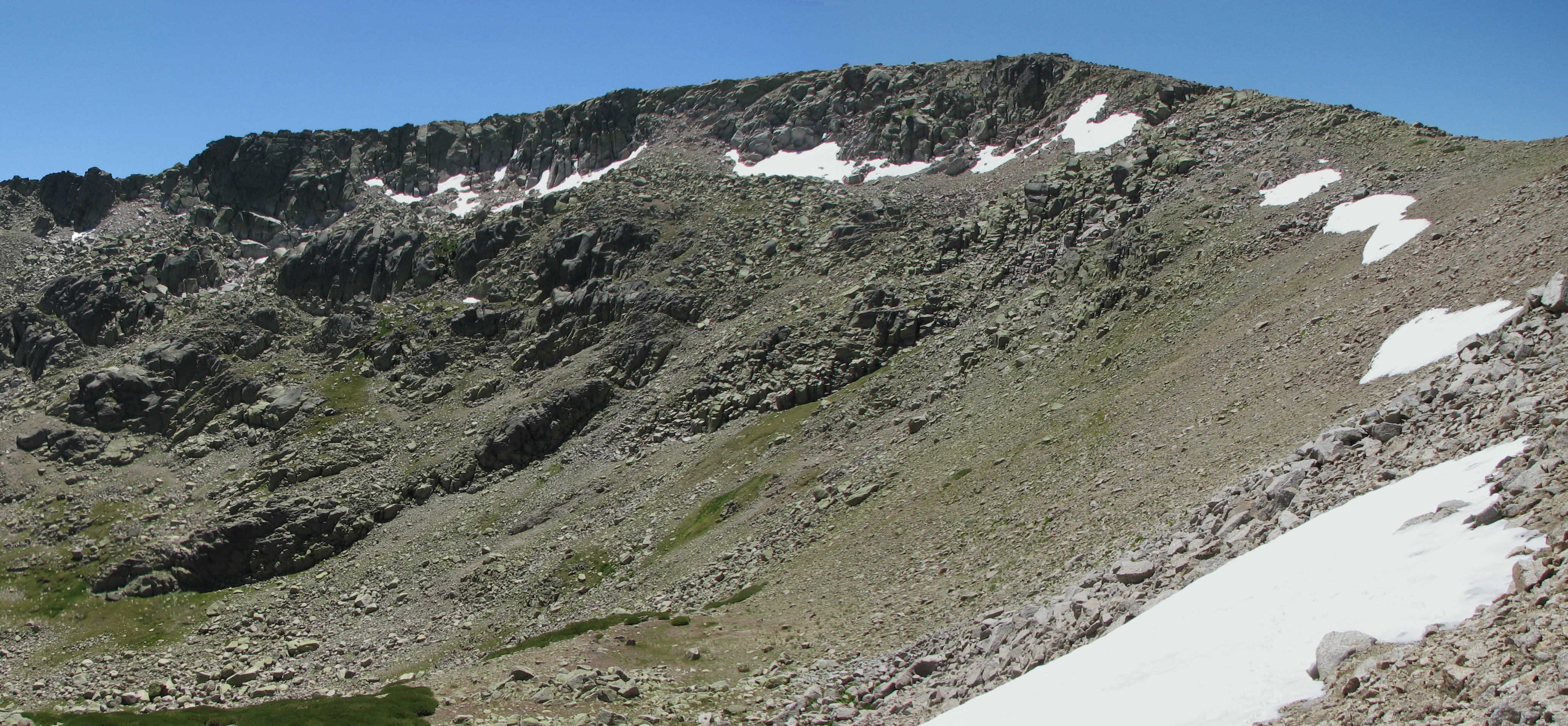 Cumbre del Canchal de la Ceja (Sierra de Béjar), vista de la cara N